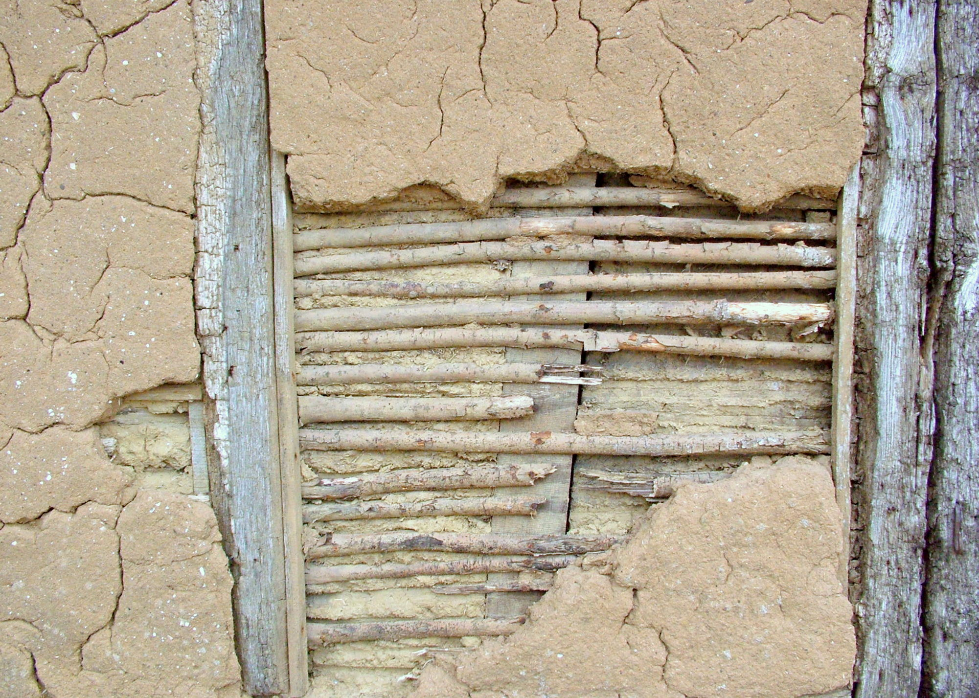 Archeon, Wand eines Lehmhauses.